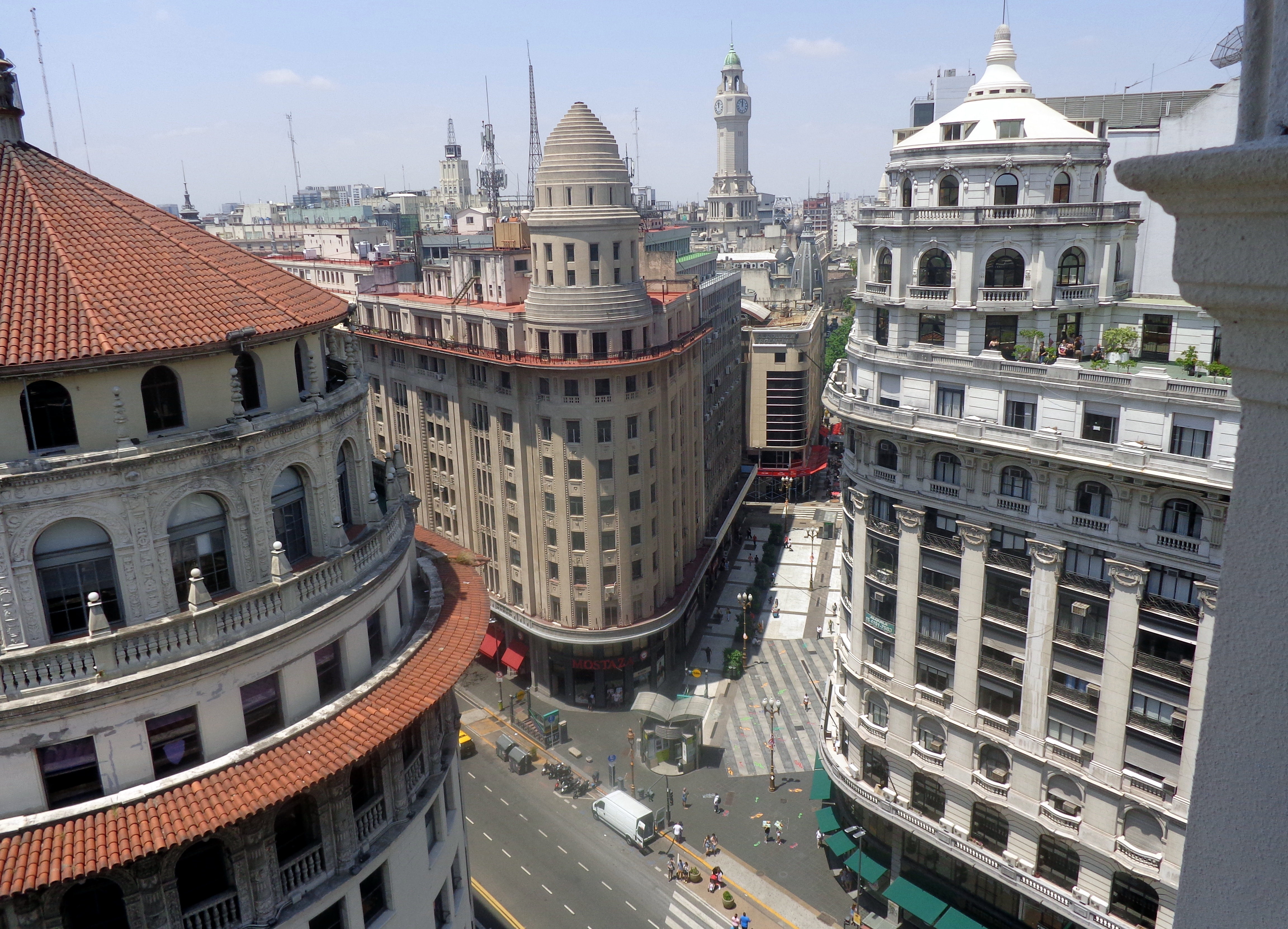 Edificios Banco de Boston, La Equitativa del Plata y Miguel Bencich. Vista desde el Edificio Bencich, Roque Saenz Peña 615 (Diagonal Norte), Buenos Aires, Argentina.